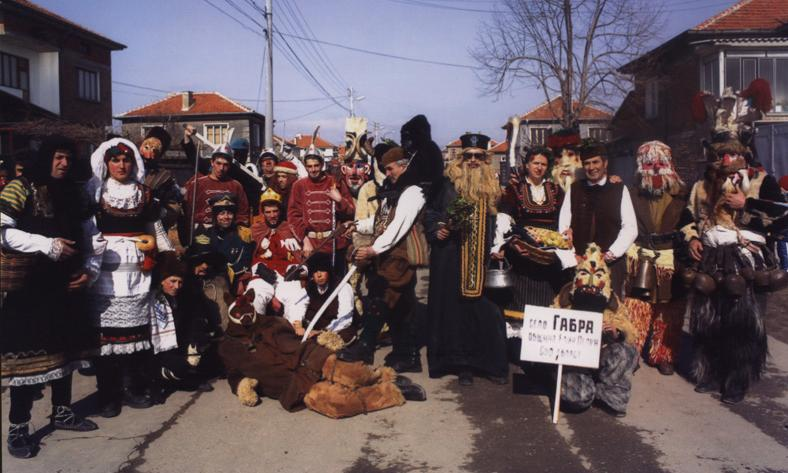 Габренски "джамали"; © 2006 Пламен Цветков